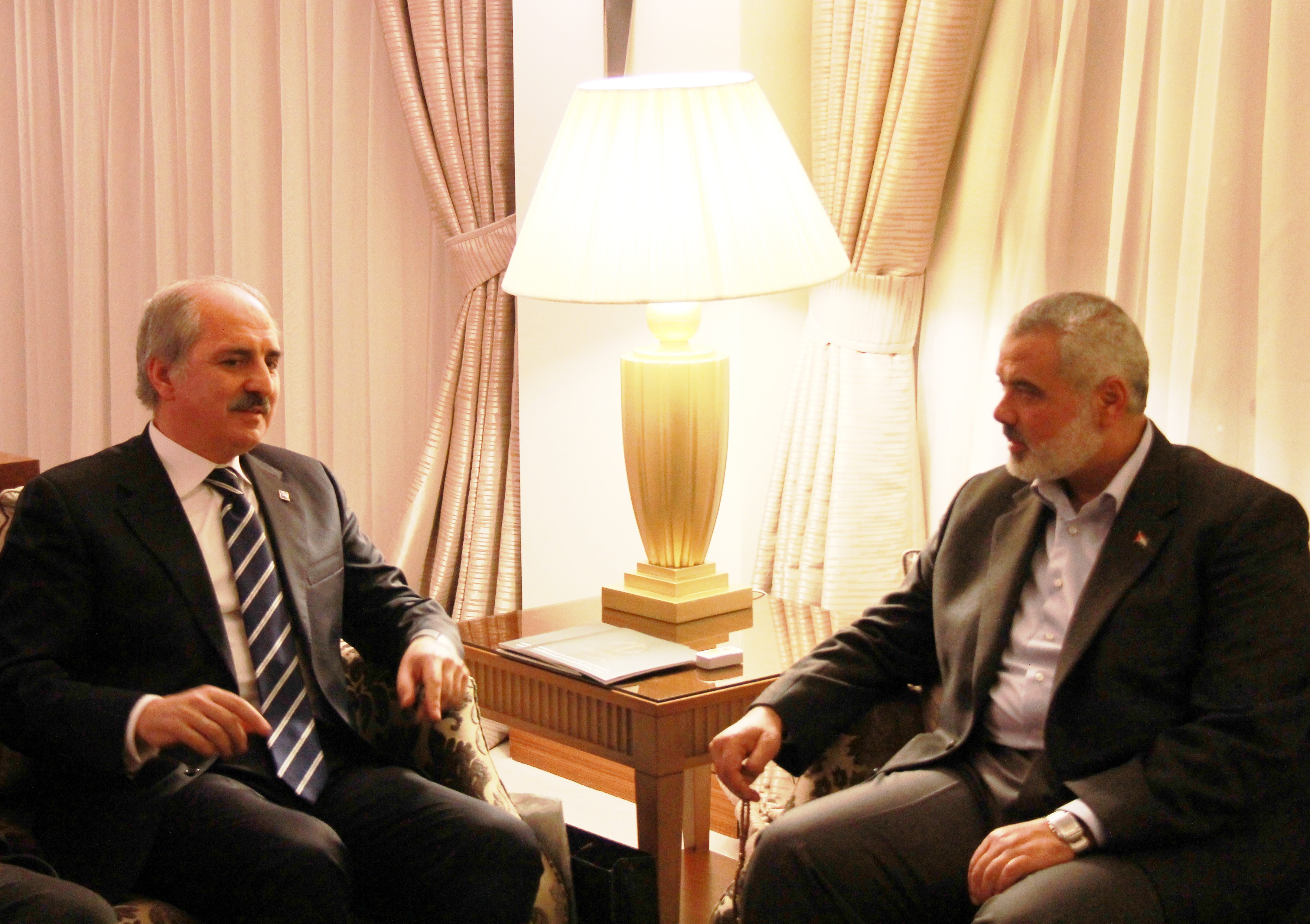 Numan Kurtulmuş, dönemin Filistin Başbakanı İsmail Haniye ile birlikte.